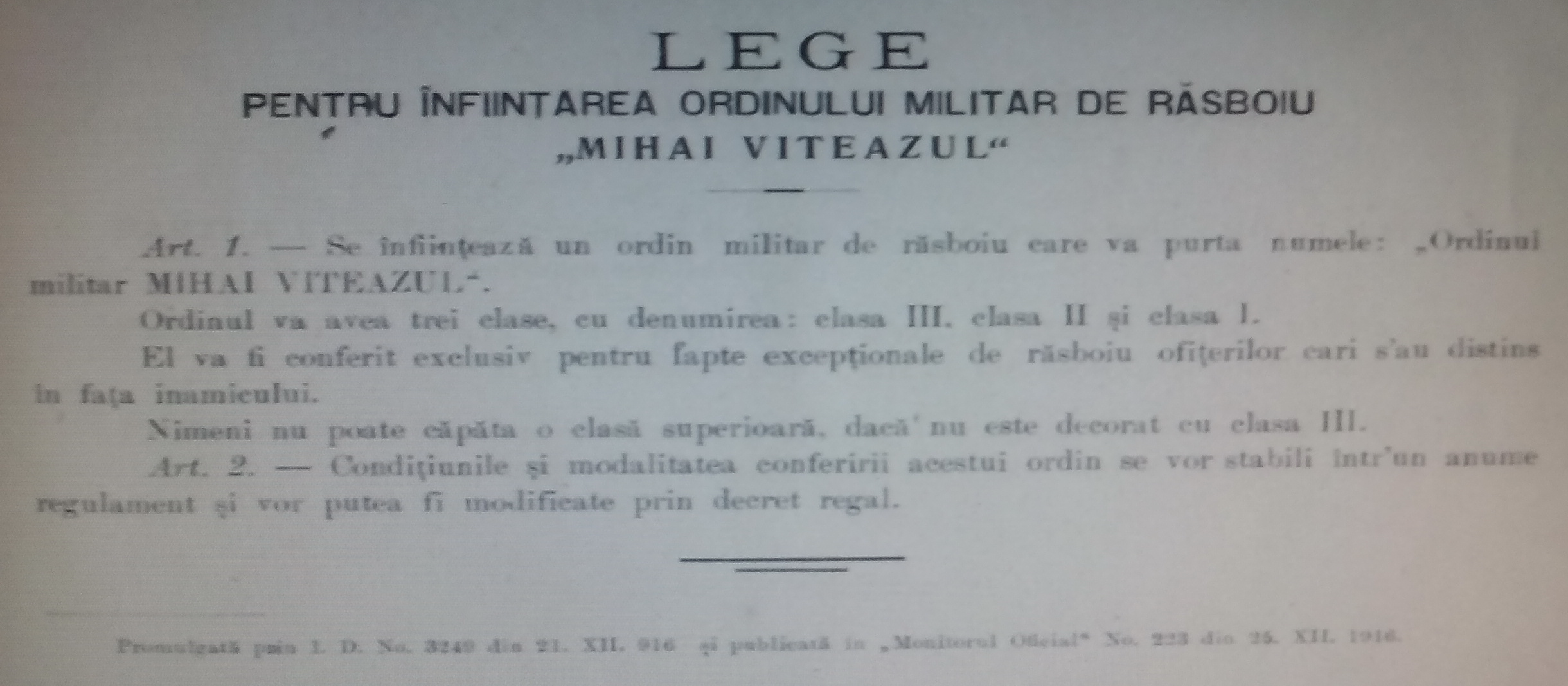 Legea de înfiinţare a ordinului Mihai Viteazul reprodusă din Anuarului ordinului Mihai Viteazu